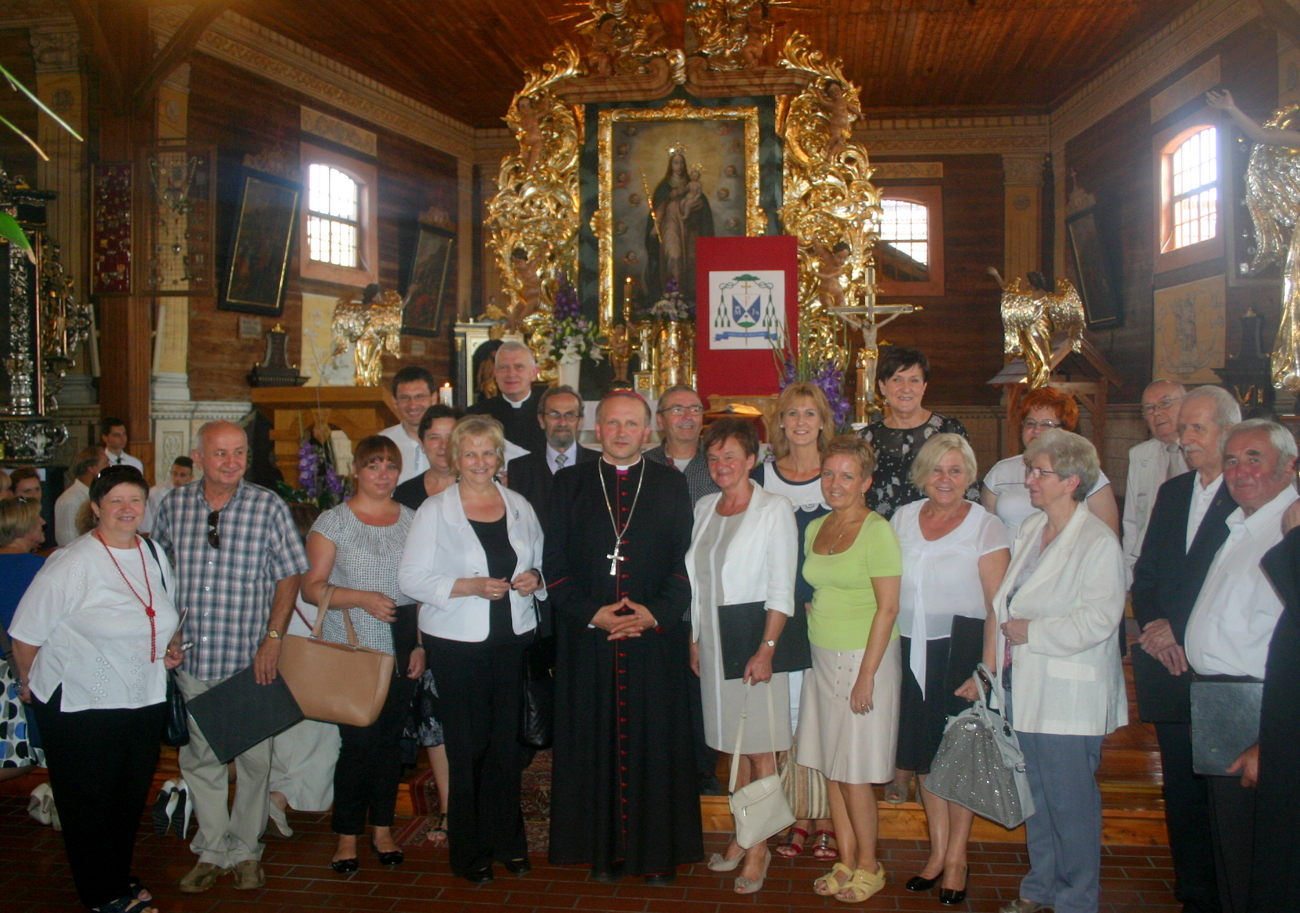 bp Łukasz Buzun z Chórem Konkatedralnym z Ostrowa Wlkp. Pólko 07.09.2014.